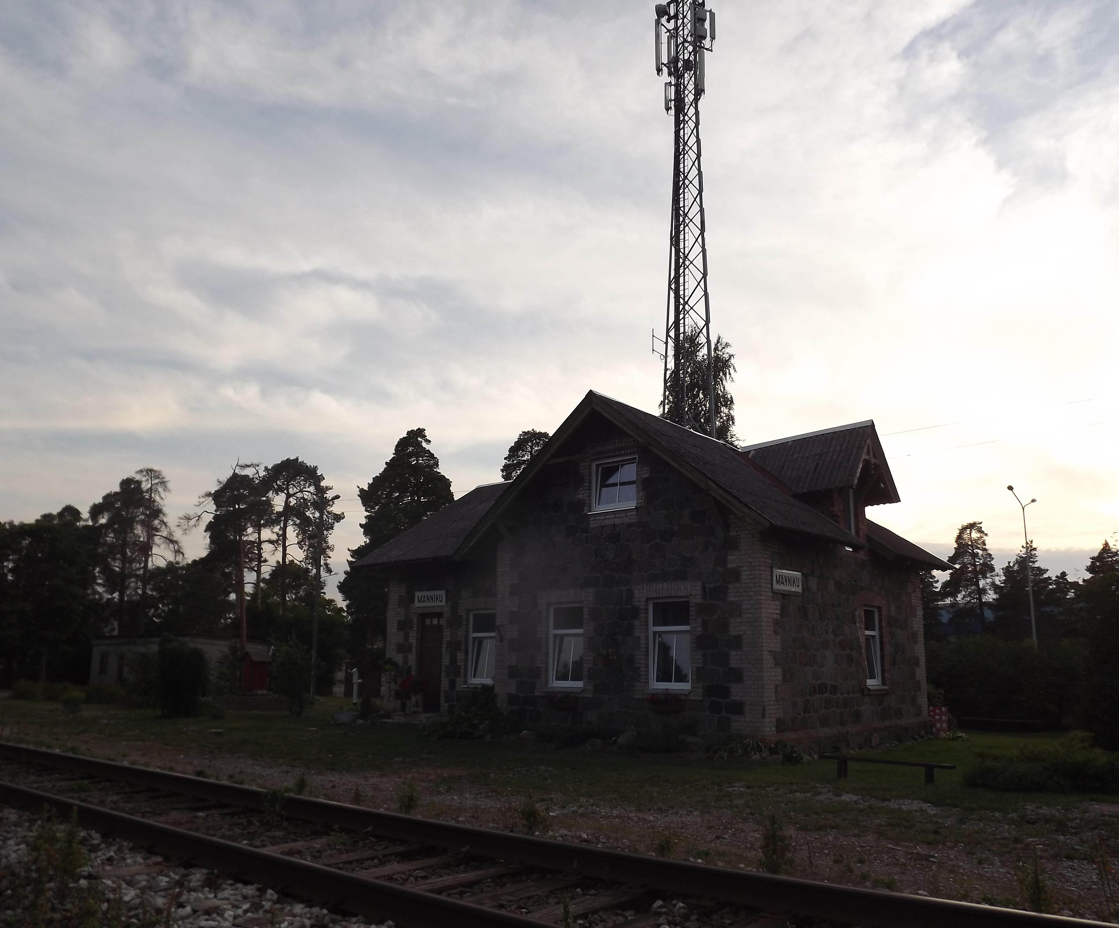 Männiku jaamahoone